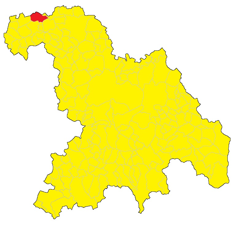 Mappa del comune di Camino (AL)